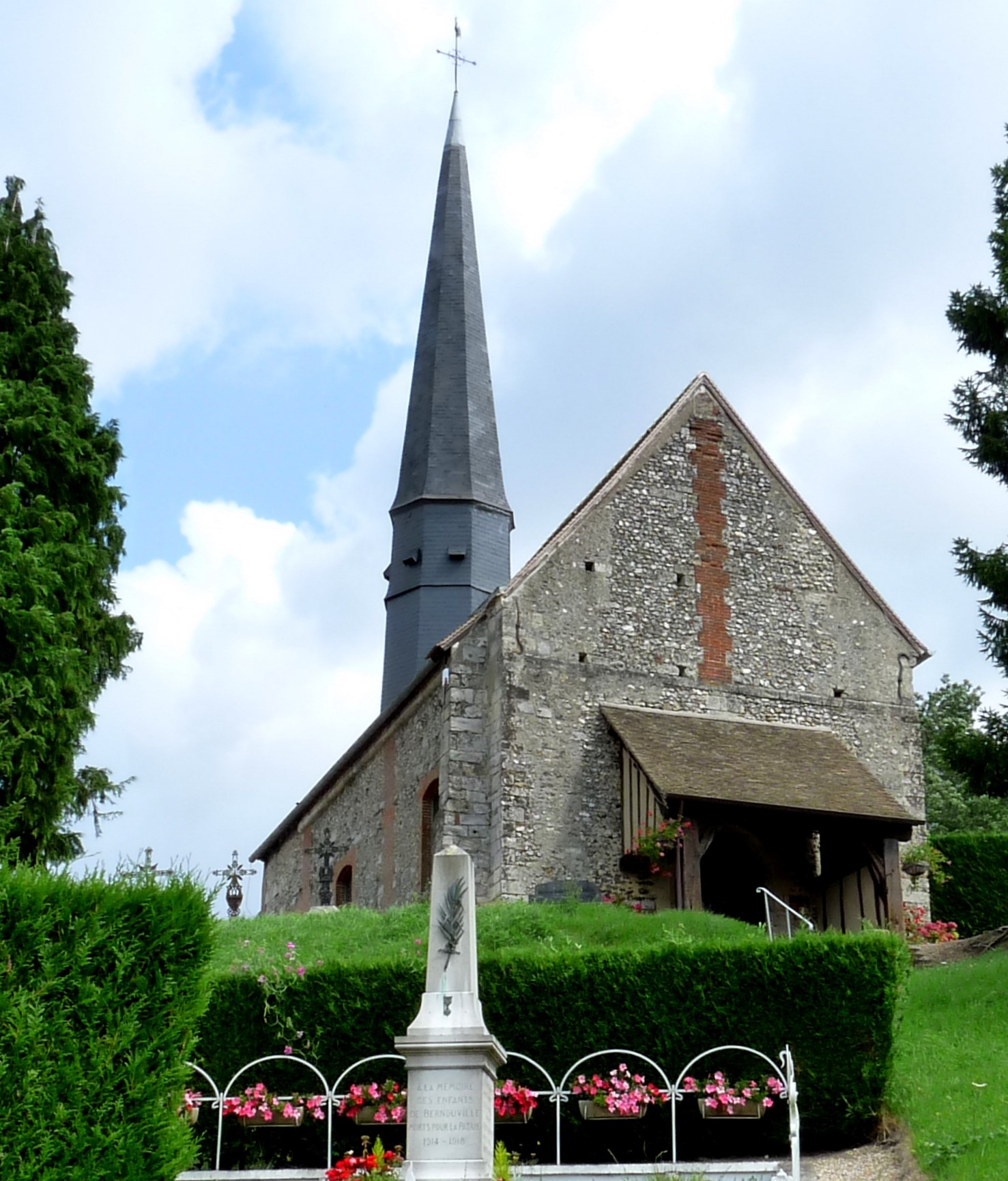 Église Notre-Dame-de-l'Assomption de Bernouville ; charpente et voûte inscrites.